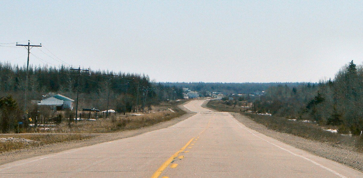 Highway 11 near Kapuskasing, Ontario, Canada